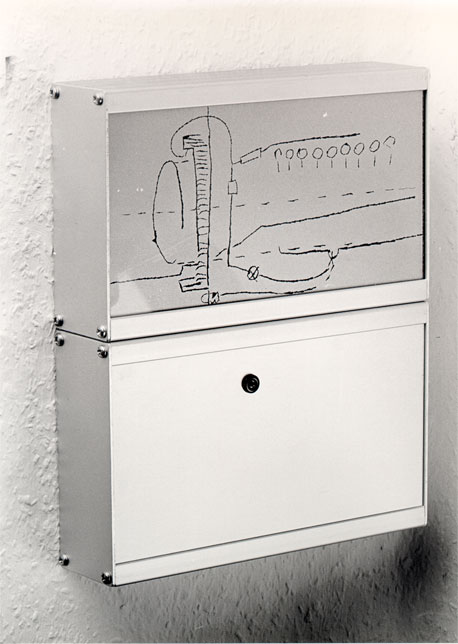 KKS/M58, Aluminium, PVC, Buchse, 20 x 17 x 4 cm, 1988